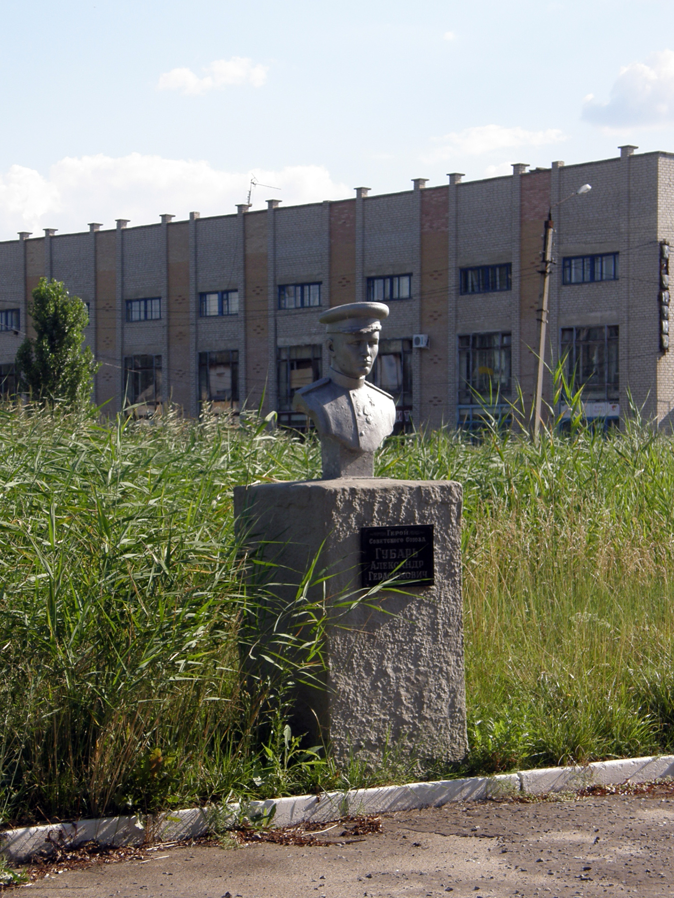 Меморіал: братська могила радянських воїнів Південного і Південно-Західного фронтів; пам'ятник Губарєву А. Г., Герою Радянського Союзу; пам'ятник Новодрану П. Ф., Герою Радянського Союзу; пам'ятник землякам, Бахмутський район, Бахмутський р-н, Сіверська м/р, м. Сіверськ, вул. Леніна, Парк Слави